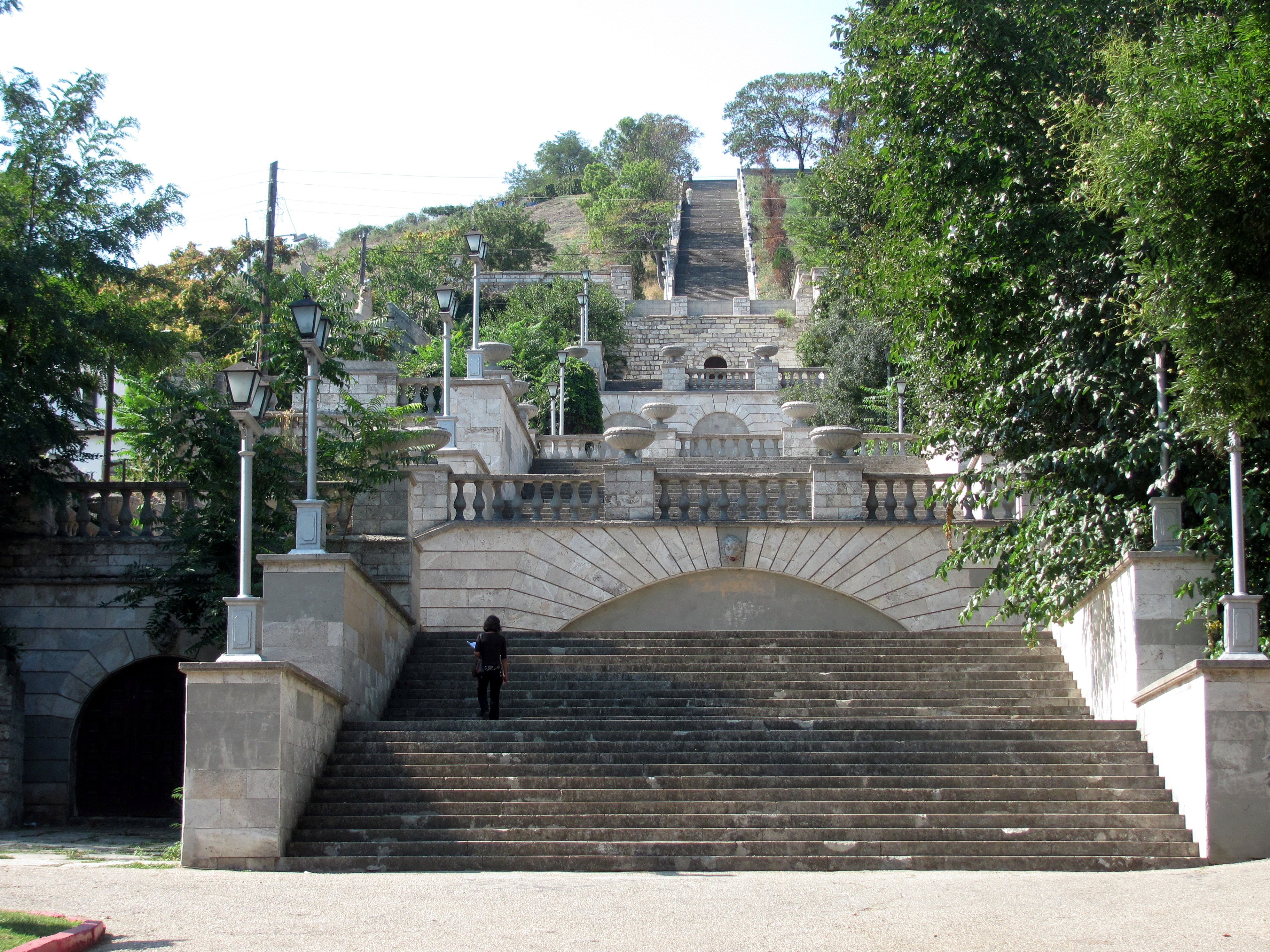 Большая Митридатская лестница